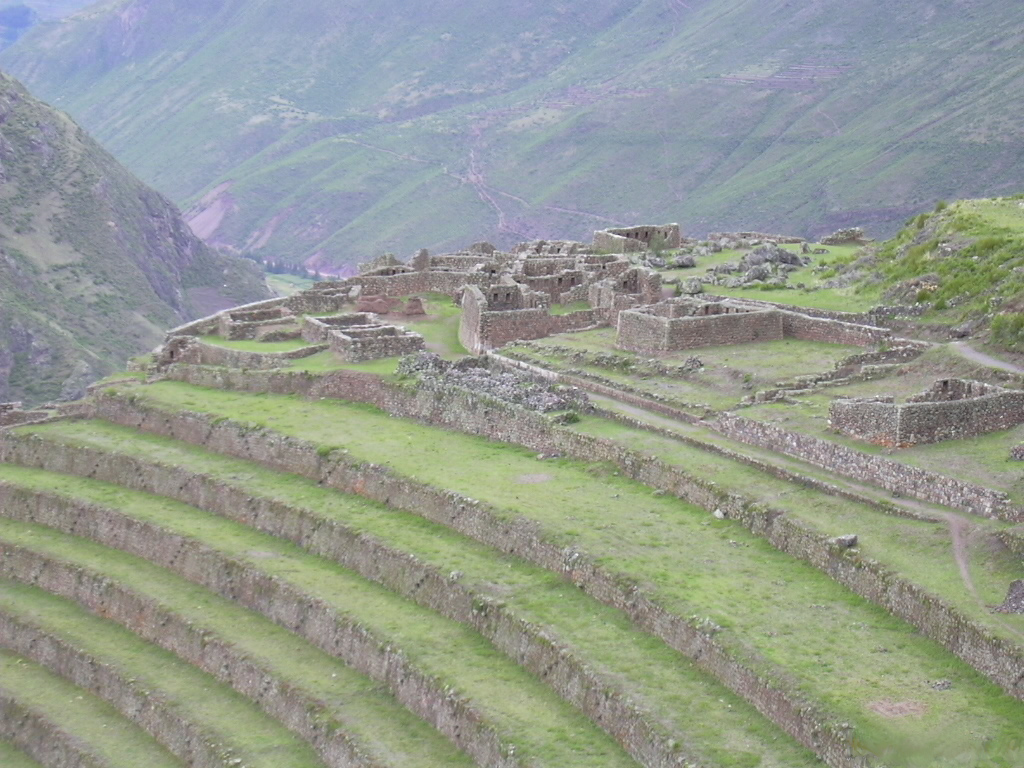 Pisac Inca ruins.